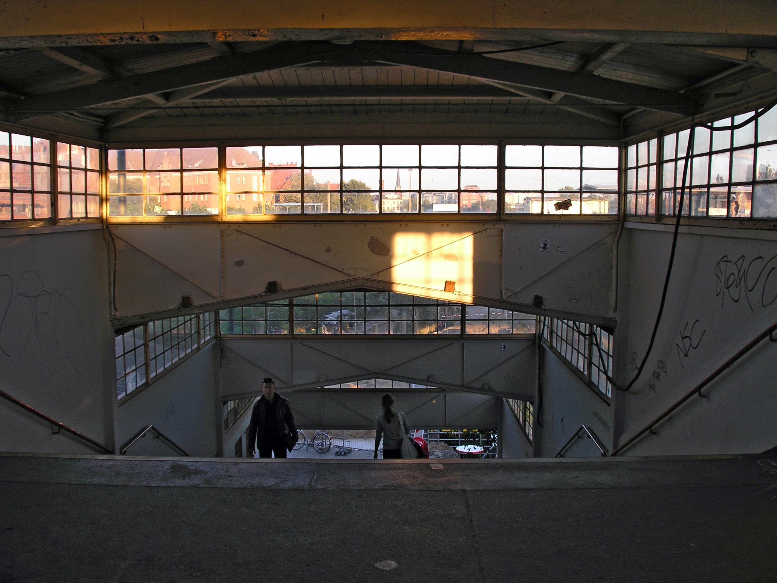 Berliner S-Bahnhof Ostkreuz, dreiteiliger Aufgang der 1923 erbauten Fußgängerbrücke in Richtung Sonntagstraße – Lichtverhältnisse in den frühen Abendstunden werden realistisch wiedergegeben